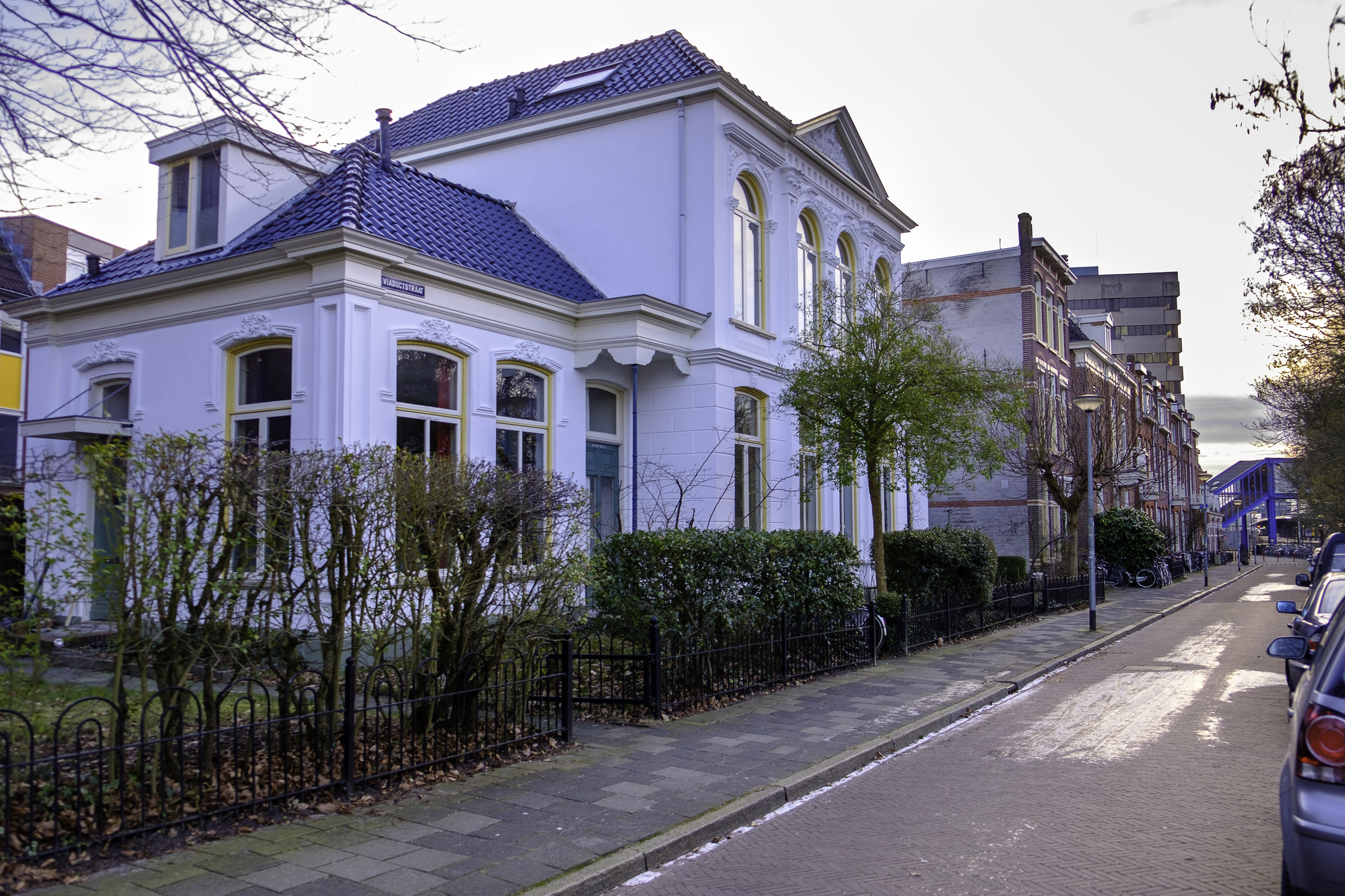 Viaductstraat in Groningen met links het Witte Huis